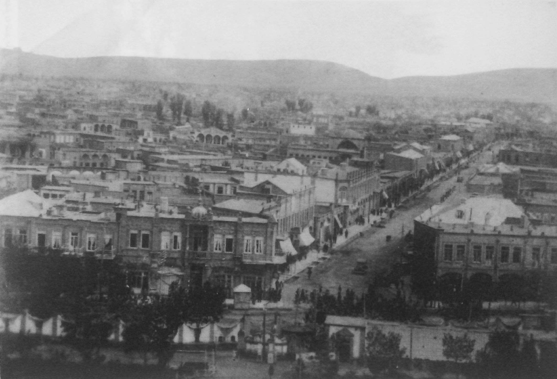 خیابان فردوسی تبریز از بالای ارگ، سال ۱۳۳۵ خورشیدی.